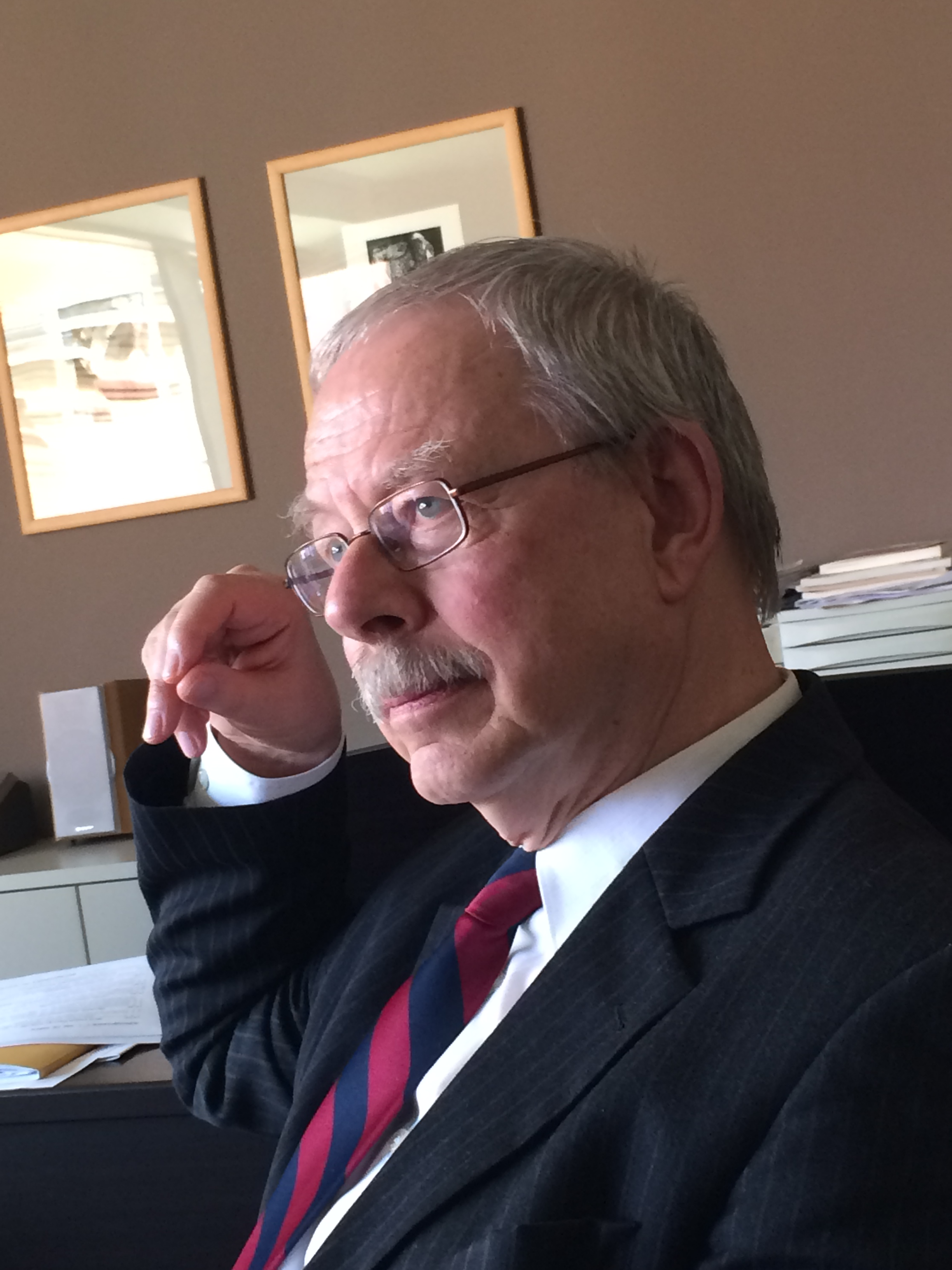 Portrait Gerd Nauhaus, Aufnahme während des Kleinen Schumann-Wettbewerbs 2016 in Zwickau